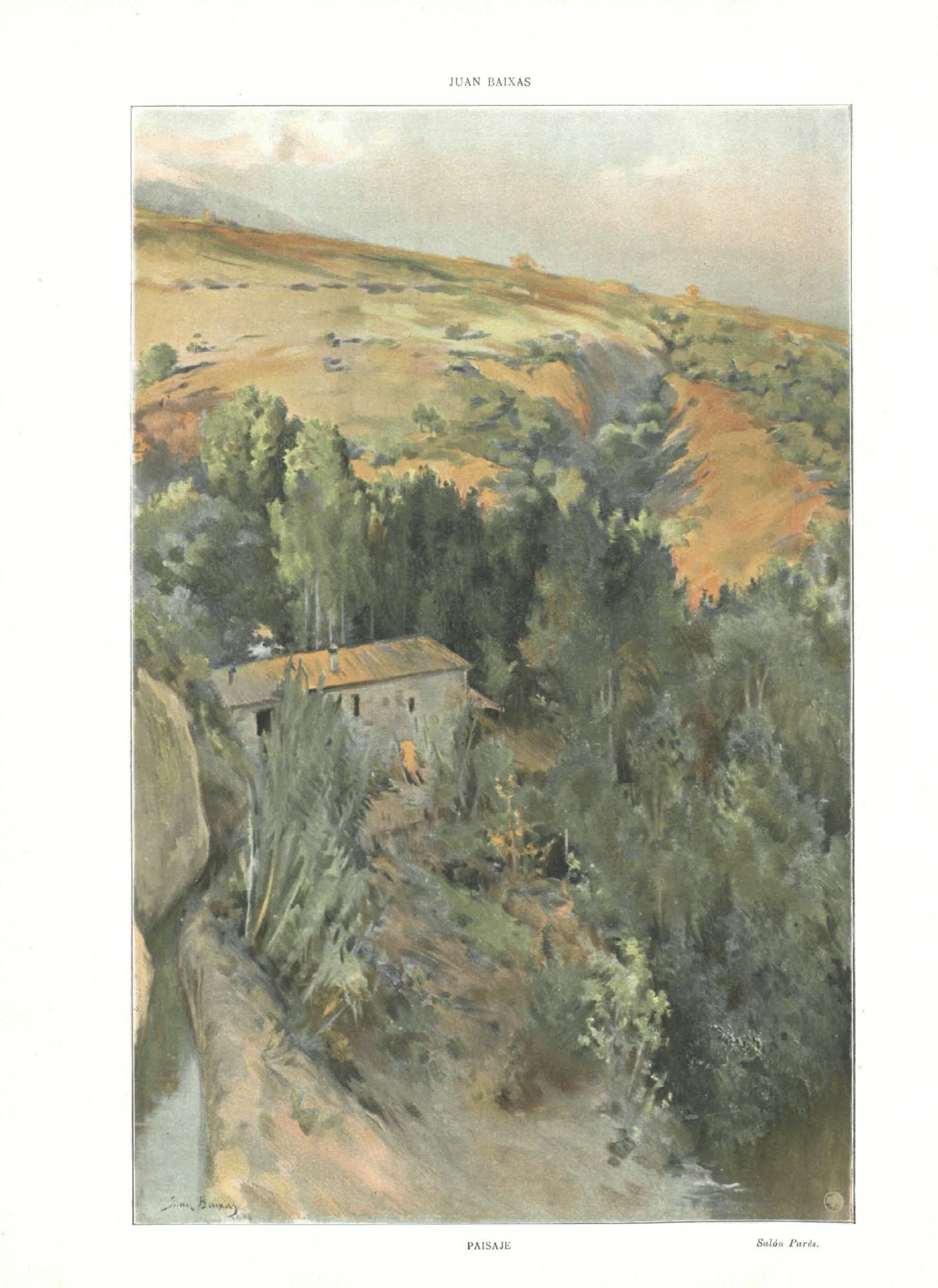 Paisaje.